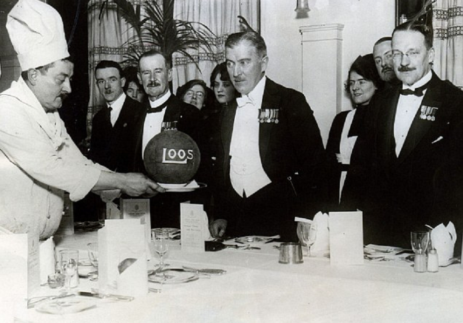 Неизвестный фотограф. Photo from the 1923 London Irish Old comrades dinner showing the historic ball